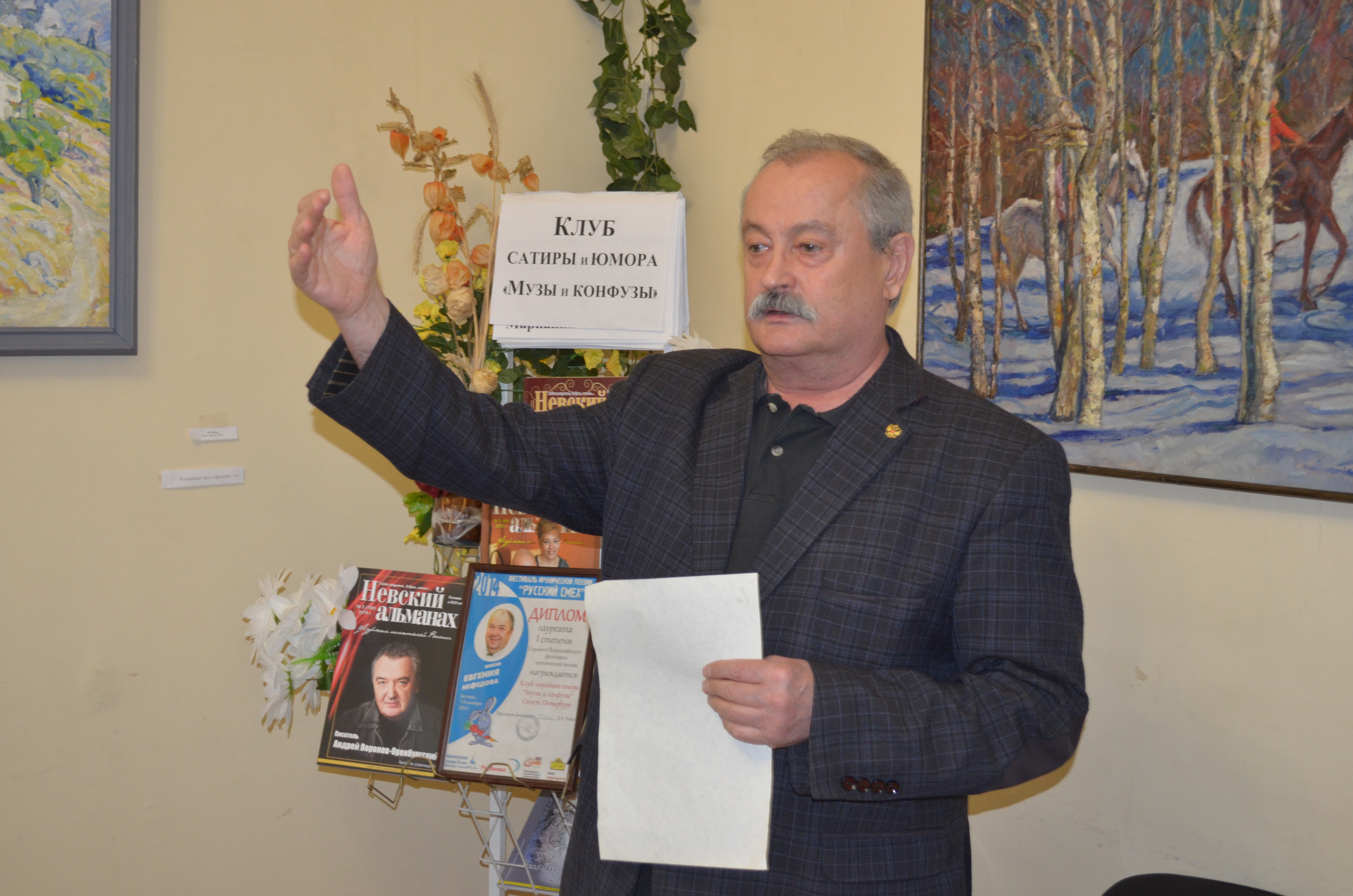 На фото Владимир Степанович Скворцов открывает заседания клуба сатиры и юмора "Музы и конфузы" в редакции журнала "Невский альманах" 5 июня 2018 года